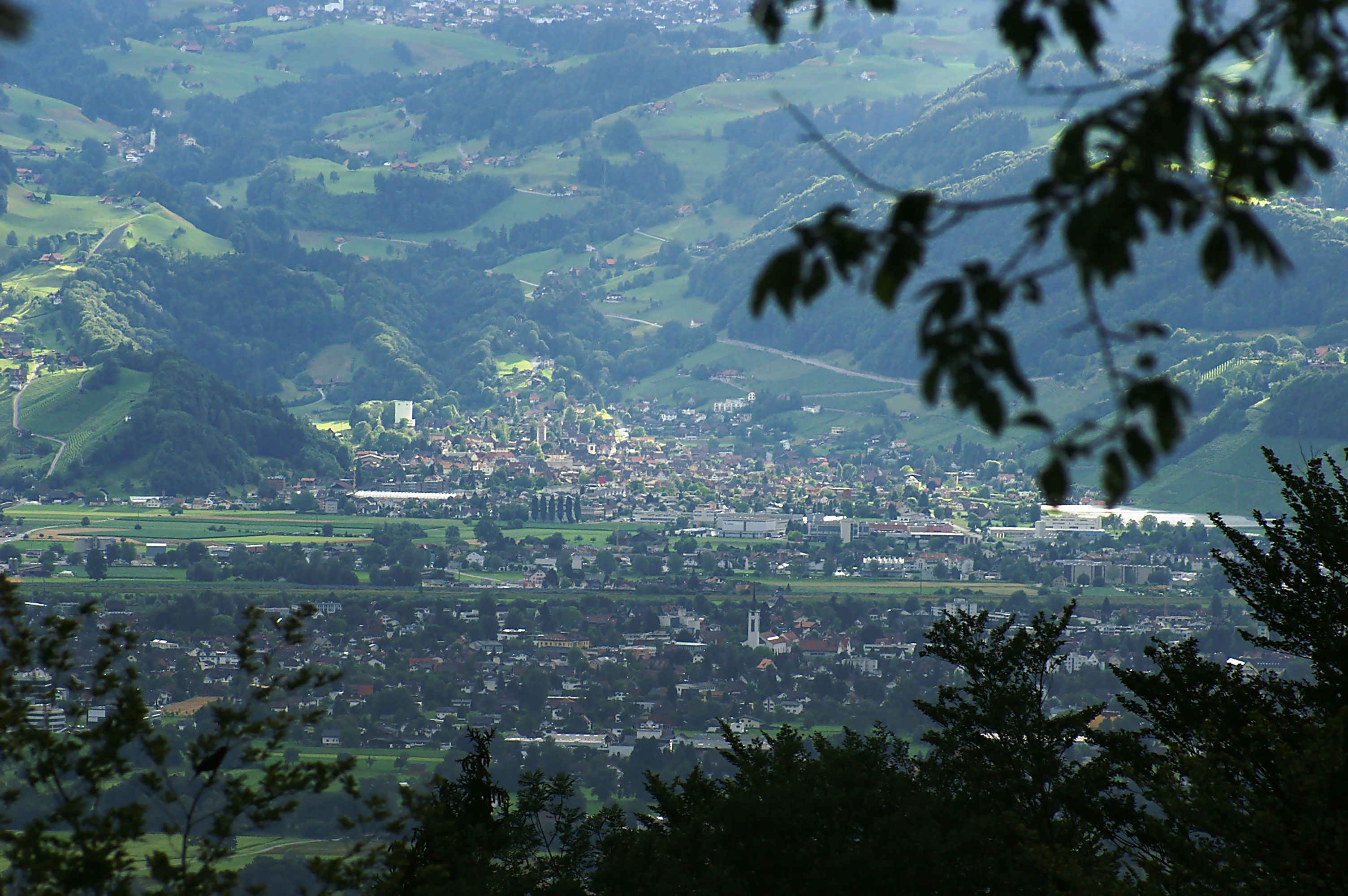 Berneck SG gesehen vom Oberfallenberg in Dornbirn